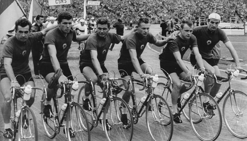 Friedensfahrt, Mannschaft aus Jugoslawien Zentralabild-Wendorf Ks-Kr 3.5.1961 Jugoslawische Mannschaft zur XIV. Friedensfahrt 1961. UBz: Die jugoslawischen Friedensfahrer vor dem Start im "Stadion des Zehnten Jahrestages" in Warschau. vlnr: Alois Bajc, RadosCubric, Ivan Levacic, Andreij Boltezar, Janez Zirownik und Tomas Milenkovic.